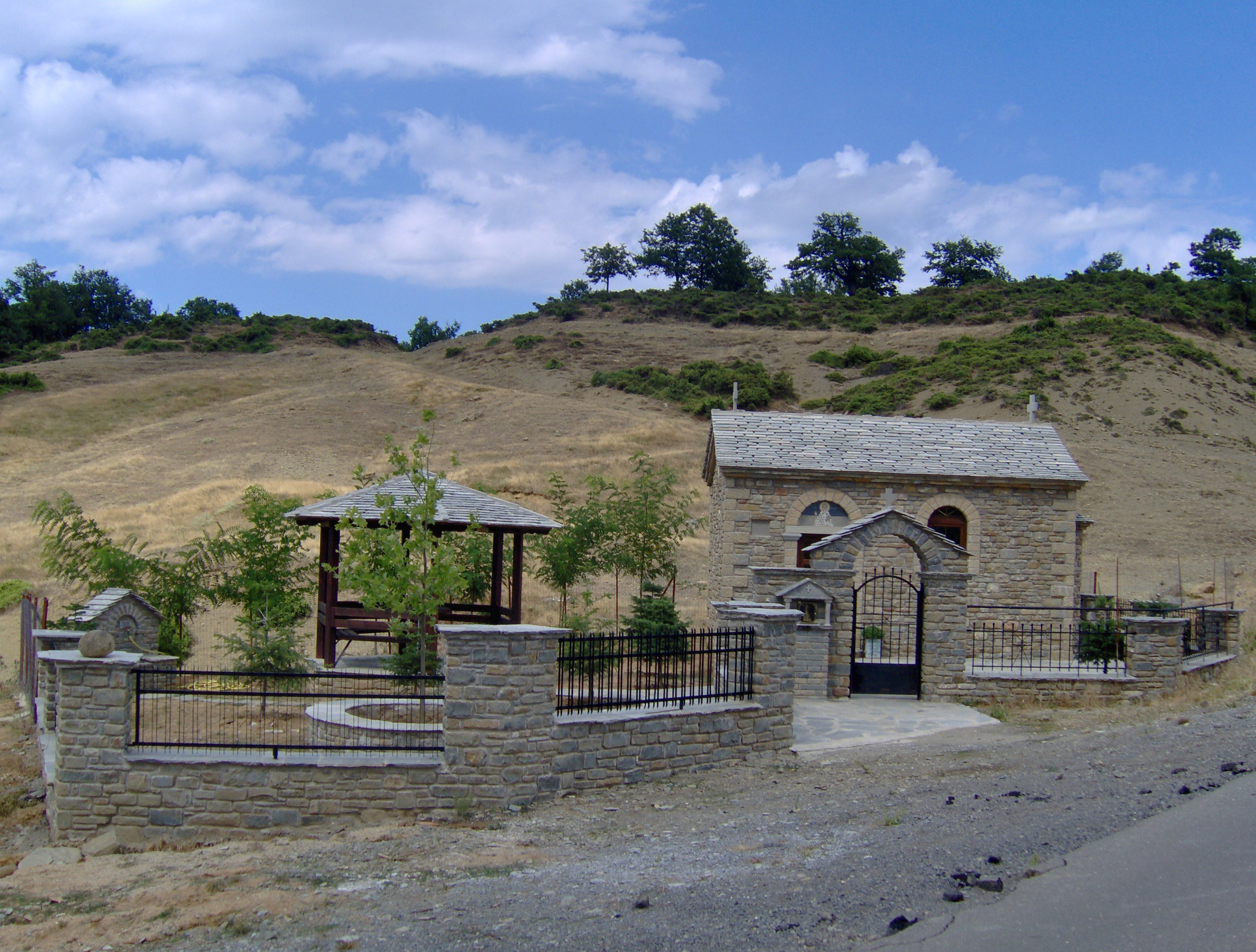 Μεσολουρι: Αγ. Αθανάσιος